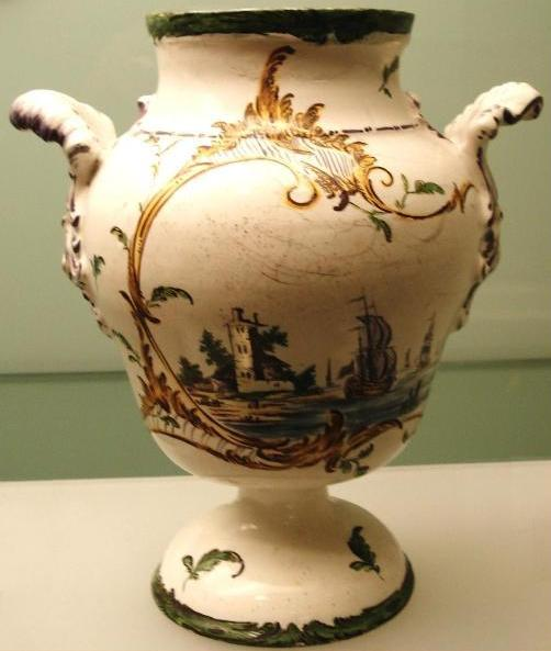 Potpurrie aus der Stockelsdorfer Fayencemanufaktur